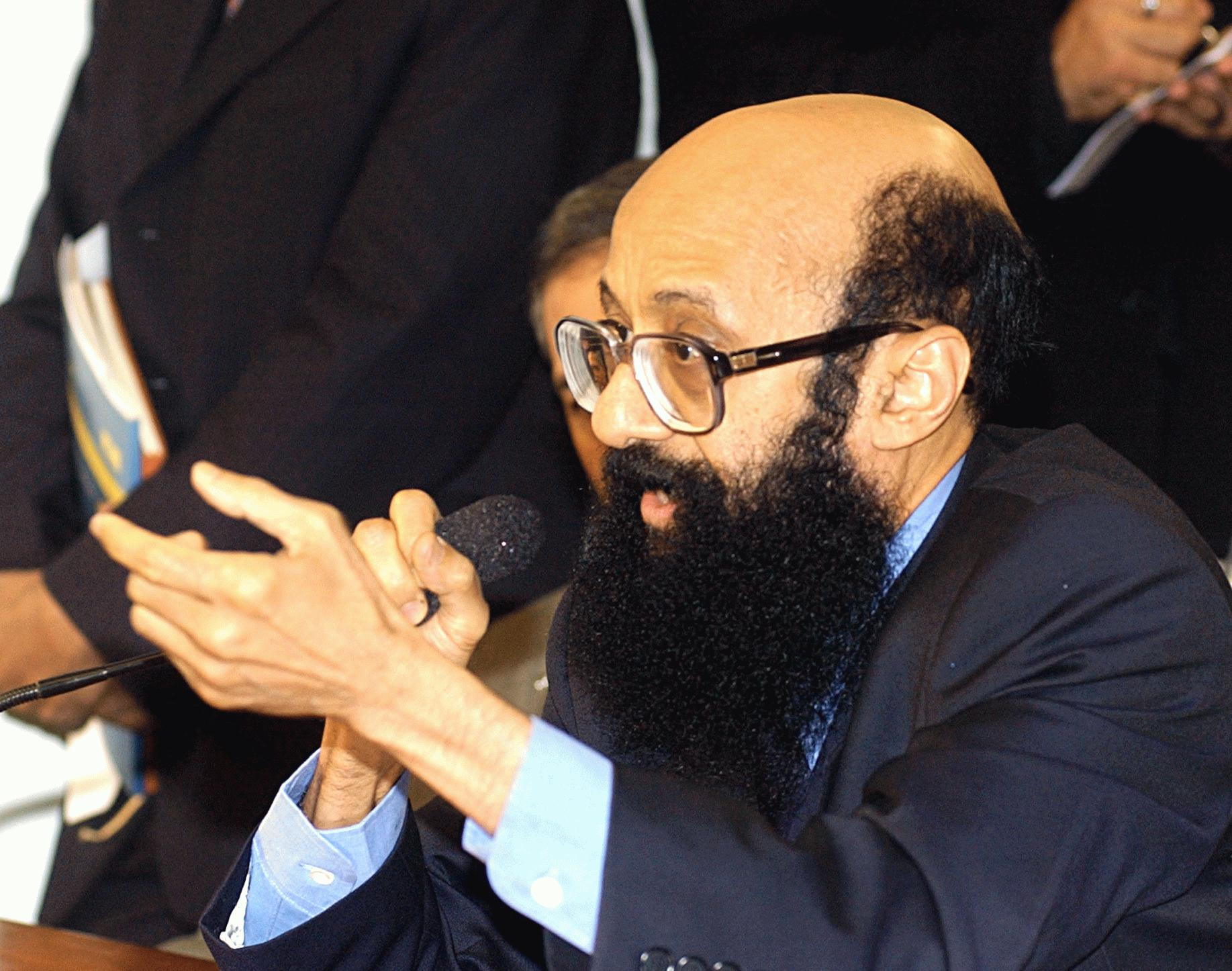 O político brasileiro Enéas Carneiro.